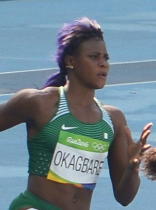 Blessing Okagbare sur la 5ème série du 200m aux JO de Rio 2016